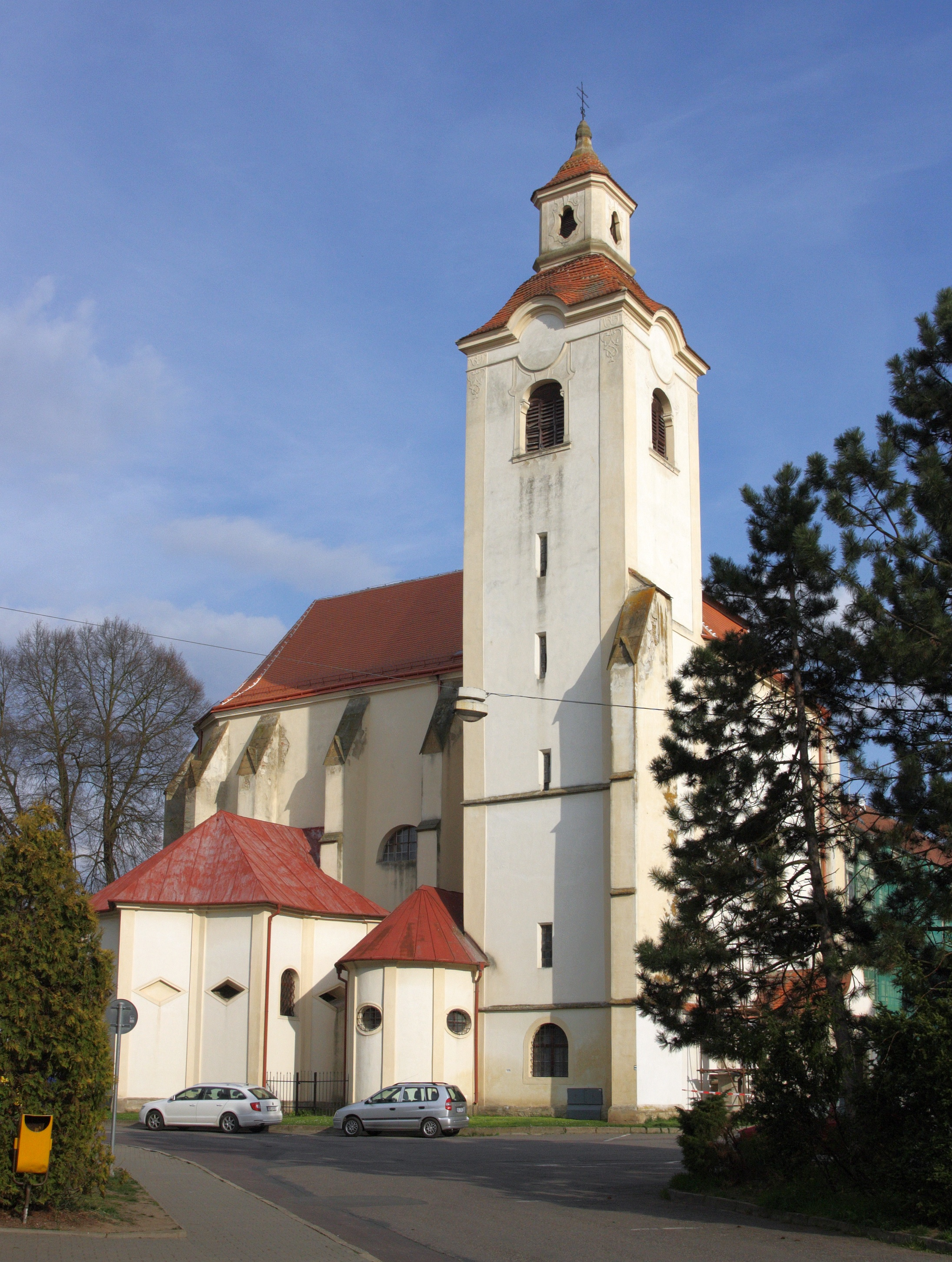 Moravský Krumlov - kostel sv Bartoloměje.